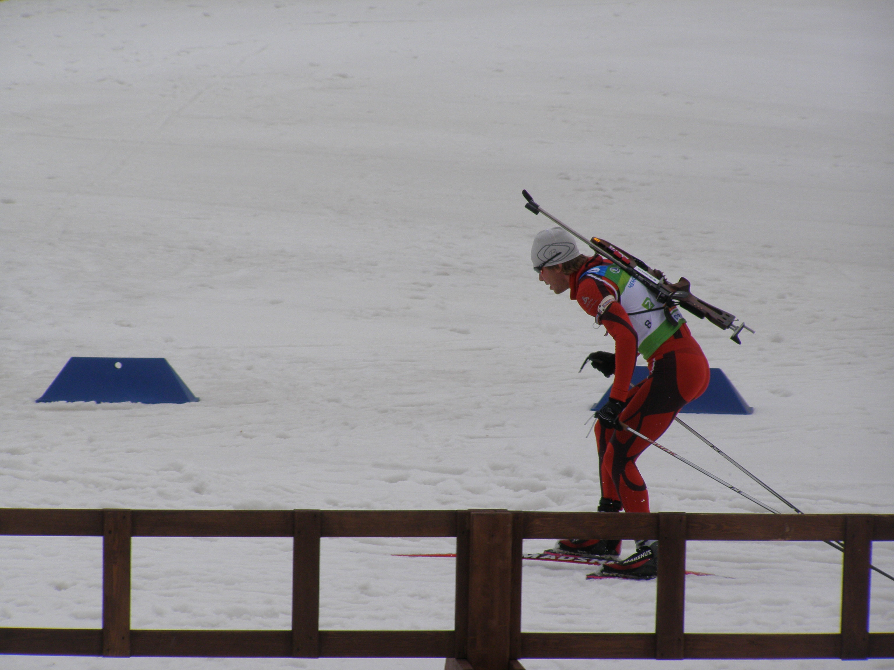 Ĉapmionkonkurso de Rusio pri Biatlono - 2012. La biatlona centro "Ĵemĉuĵina Sibiri" (Perlo de Siberio), Tjumena distrikto, Tjumena provinco, Rusio.